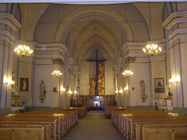 Wnętrz_wojciech byyom